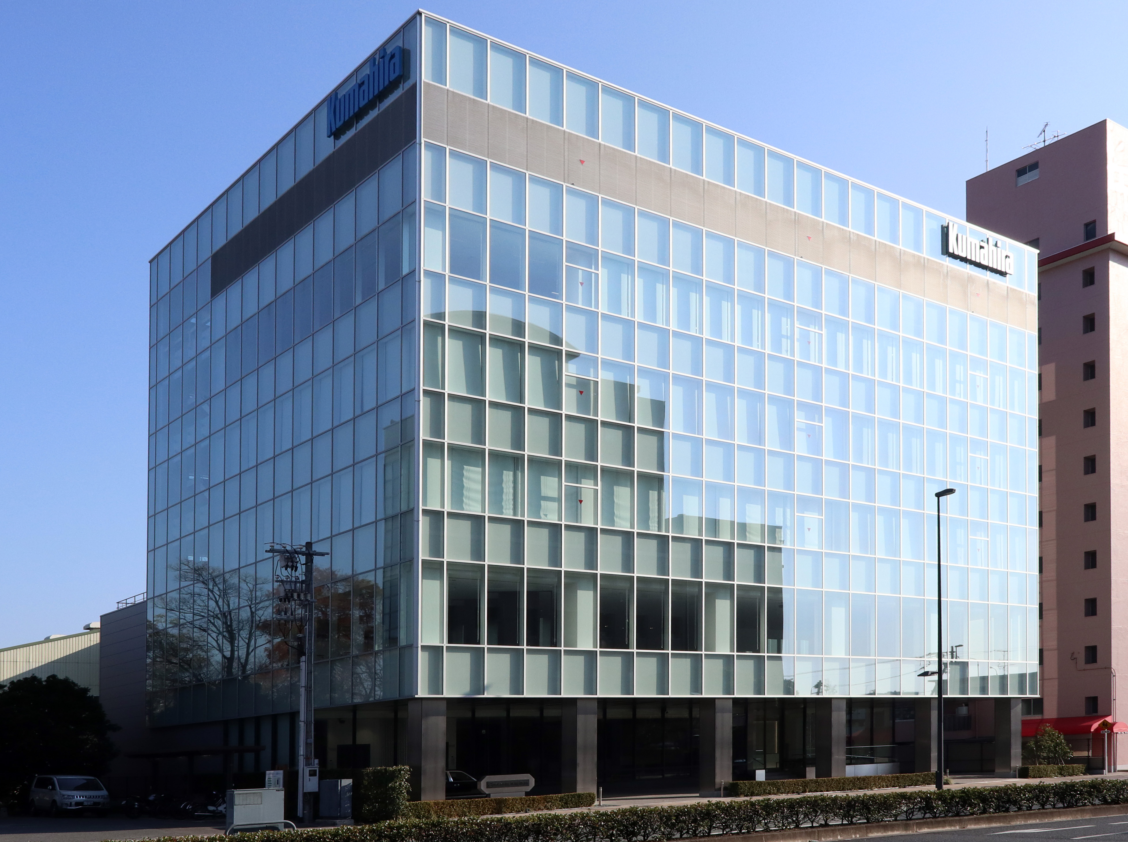 株式会社熊平製作所 本社